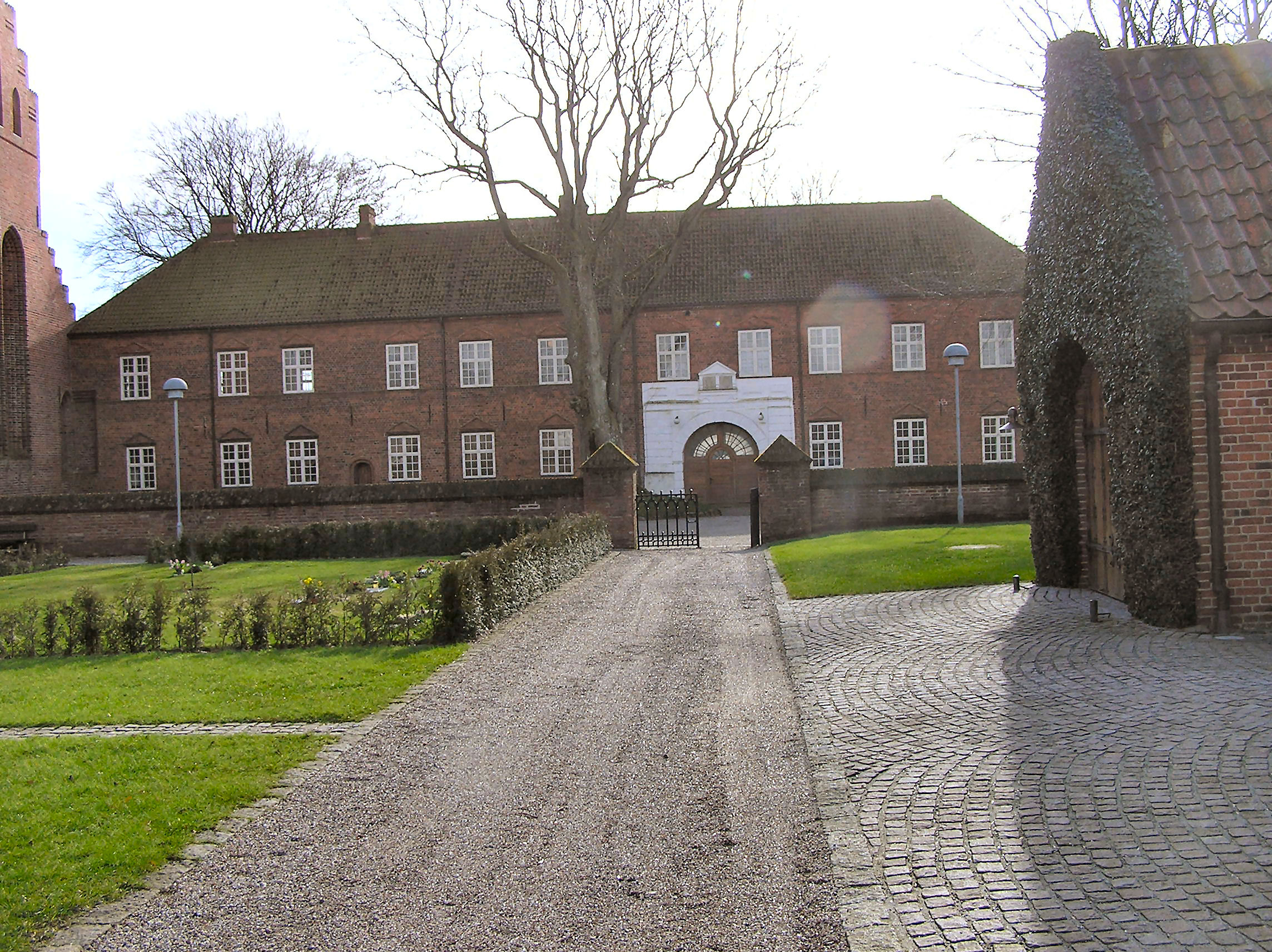 Løgumkloster, Slottet, hjemsted for Præstehøjskolen